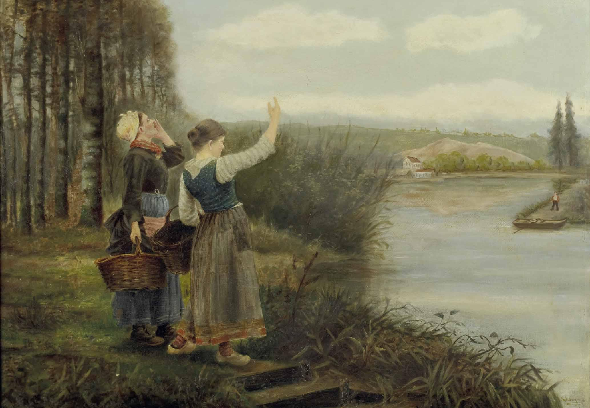 "Zwei Frauen rufen nach dem Fährmann" unten rechts undeutlich signiert: Schöngrün, Öl auf Leinwand, ca. 80 x 110 cm